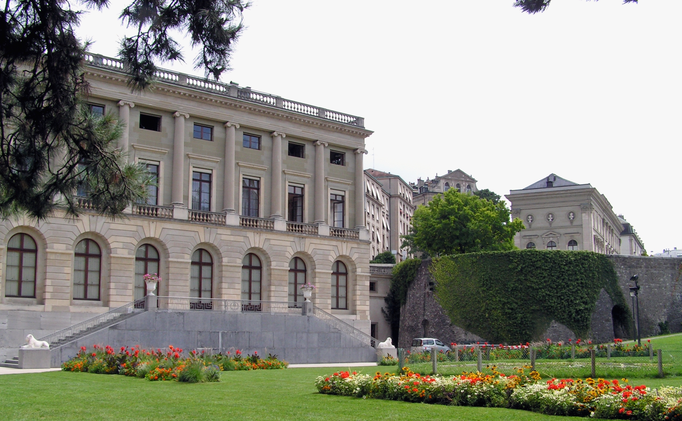 Rue de la Croix-Rouge 4, Genève. Le Palais Eynard.